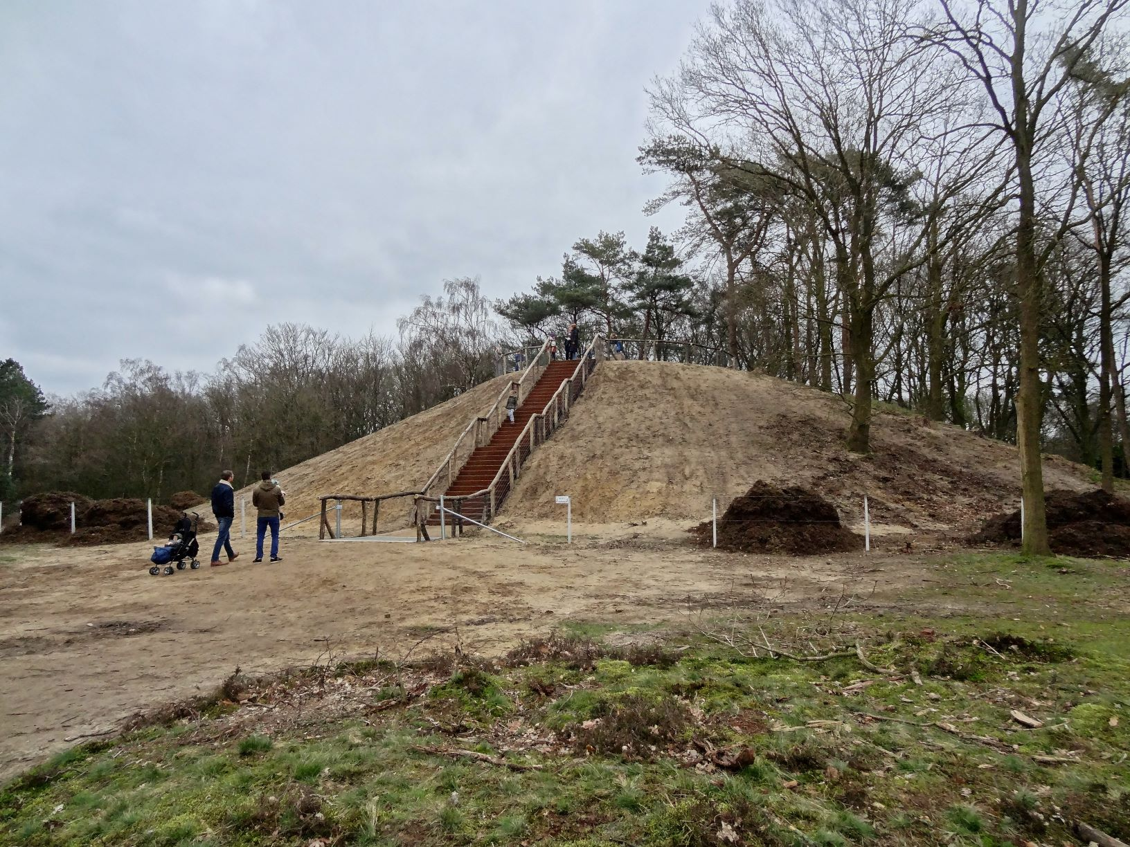 Tafelberg (Gooi) na renovatie begin 2020